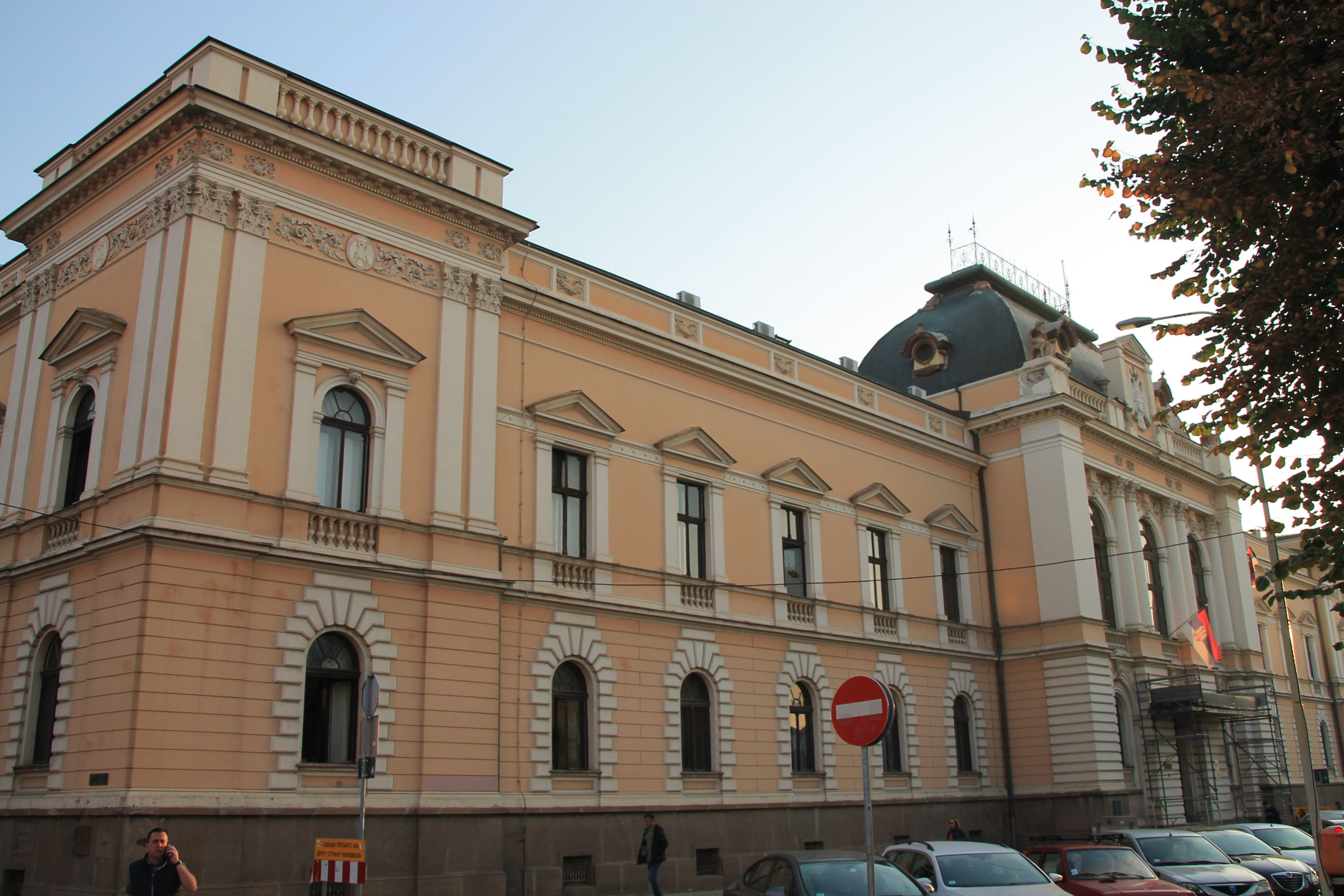 Zgrada Okružnog suda (Kragujevac)